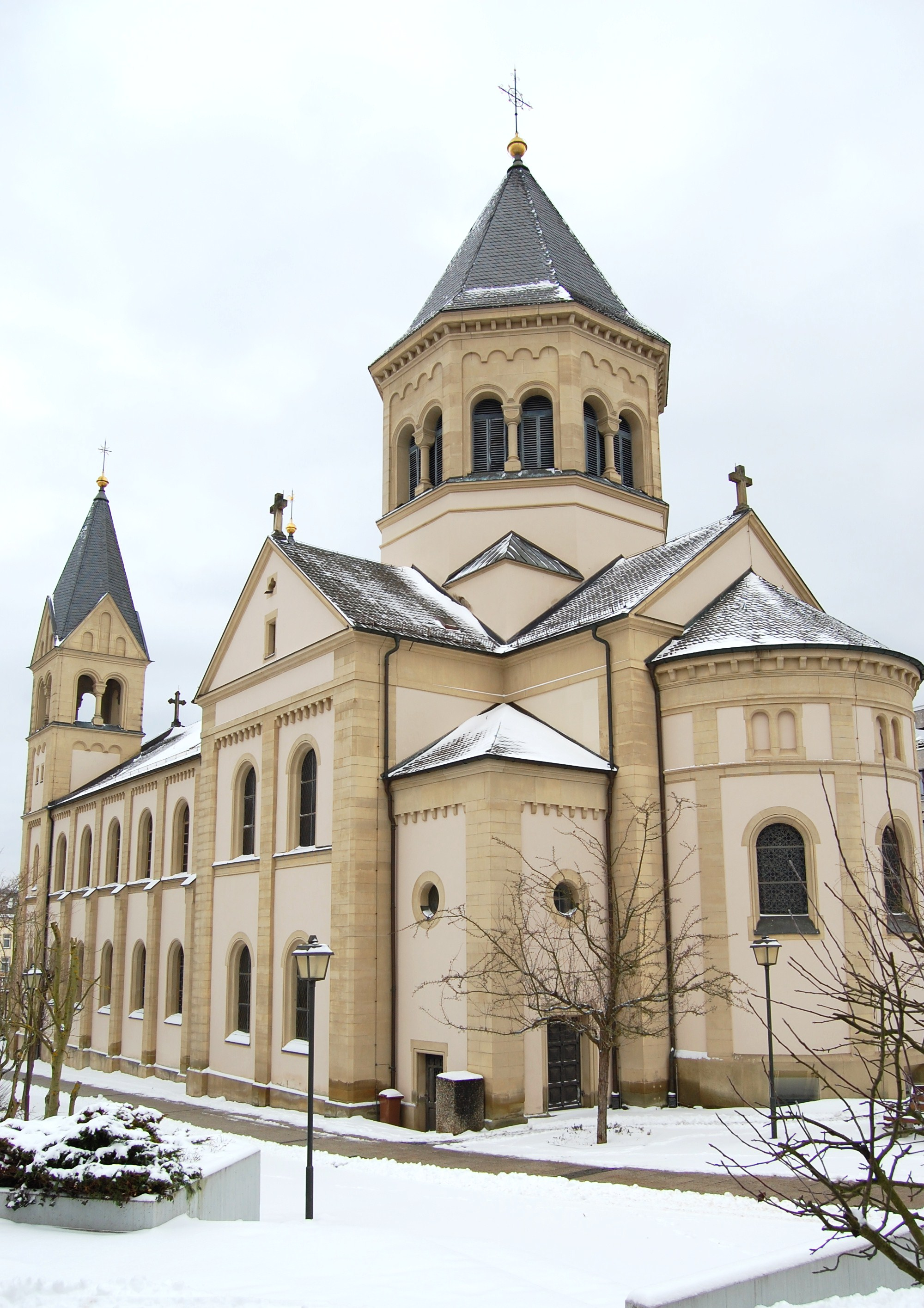 Protestantische Erlöserkirche in Bad Kissingen, Rückansicht